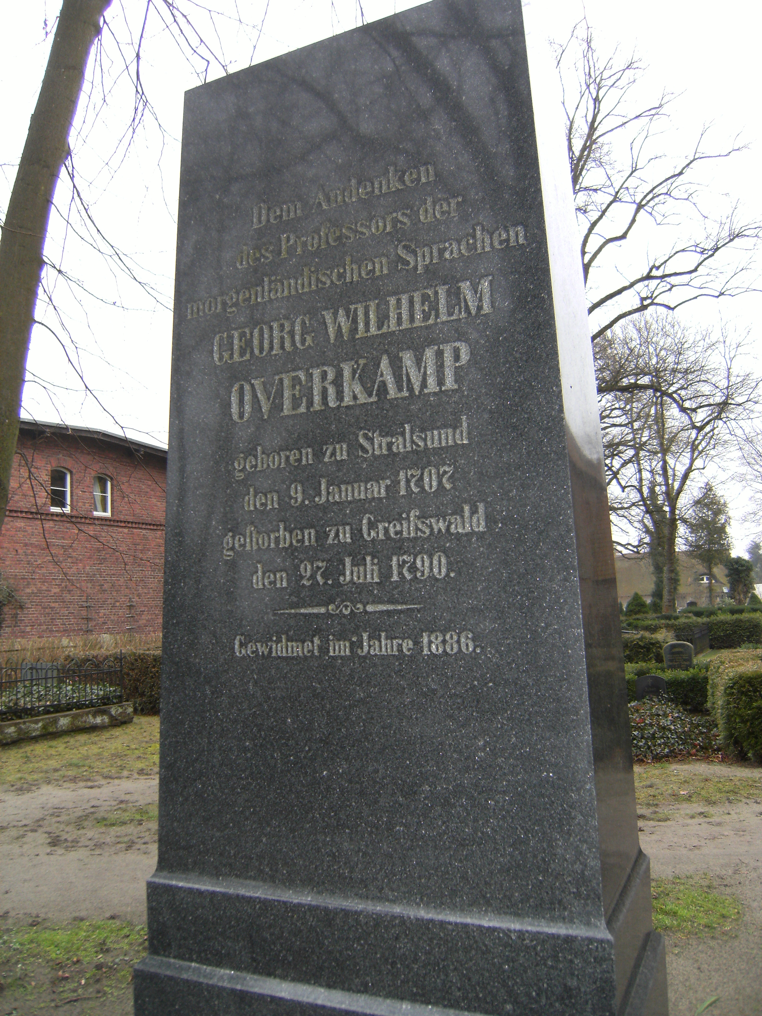 Denkmal für Stifter Overkamp in Neuenkirchen